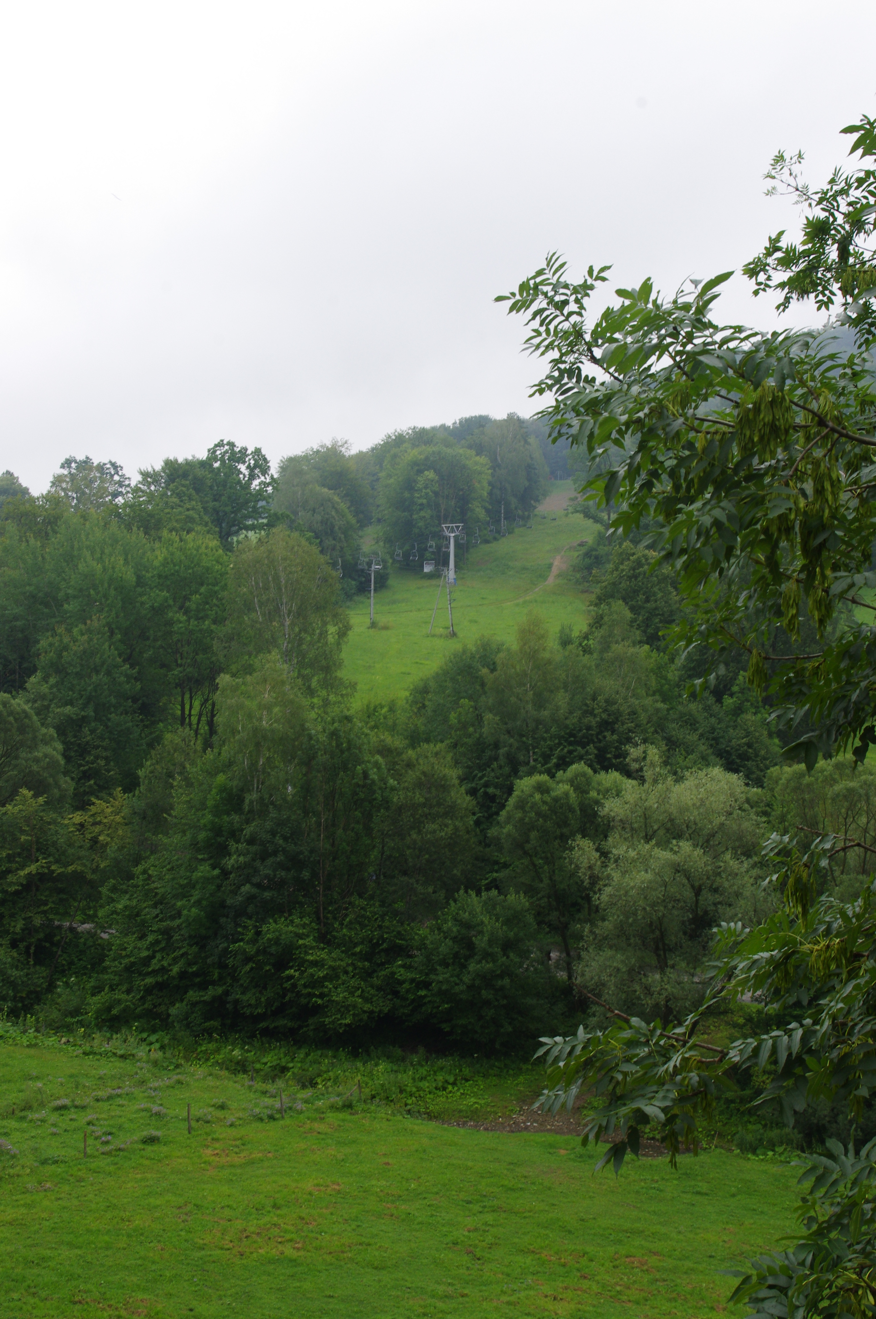 Kolejka linowa na Kiczerę w Puławach koło Rymanowa